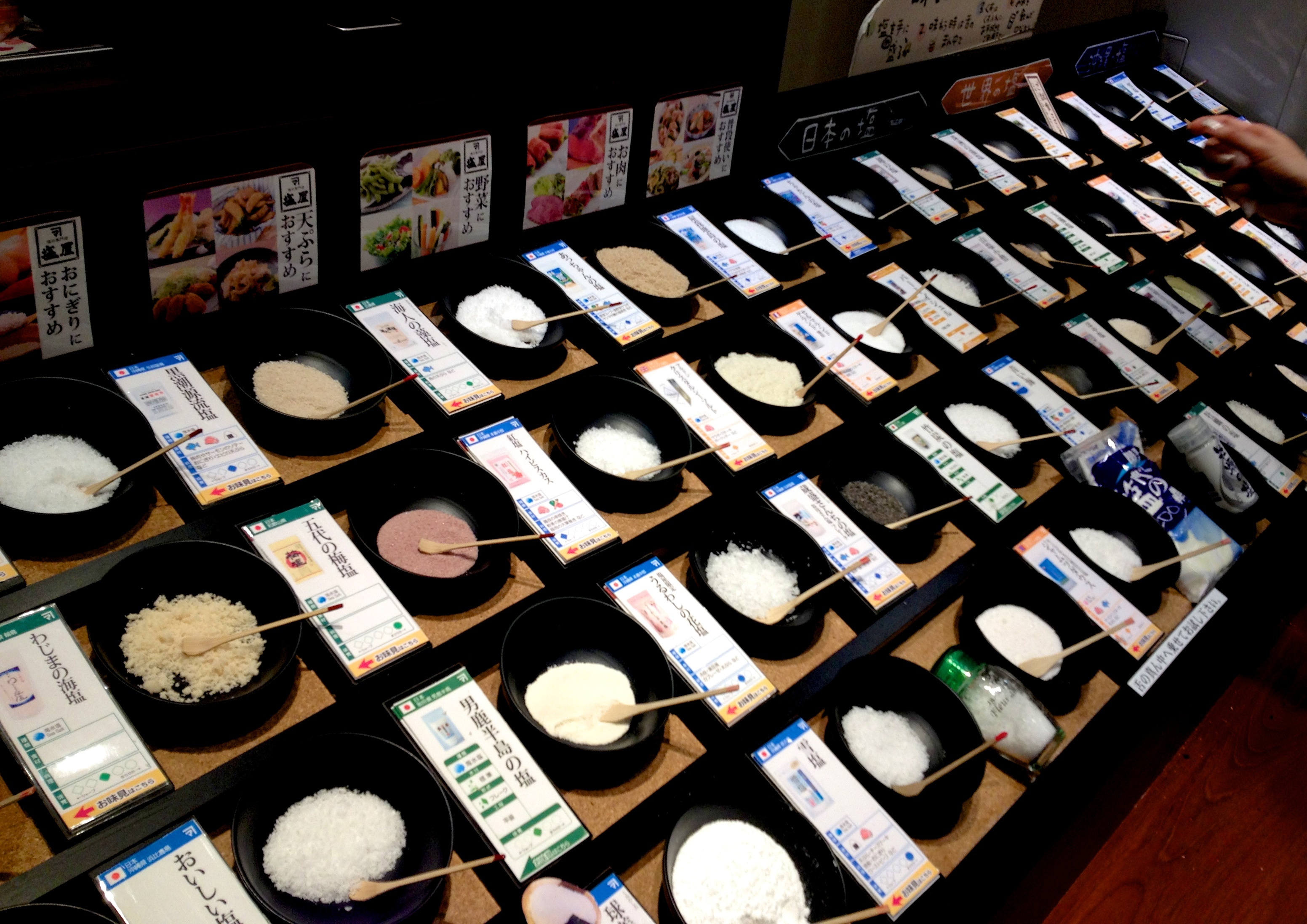 這樣賣鹽真的很屌！ (